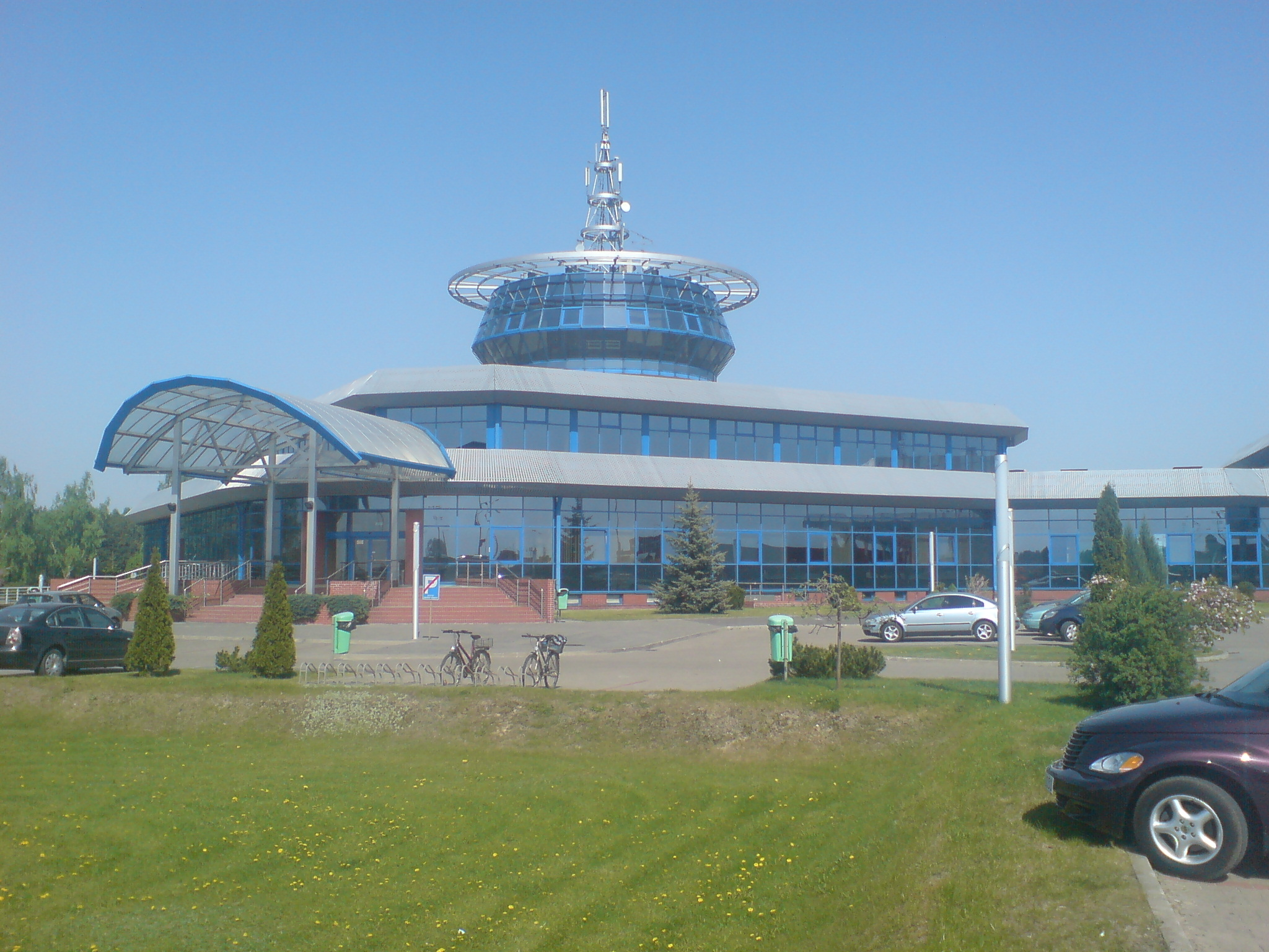 Terminal Koroszczyn (budynek główny)2